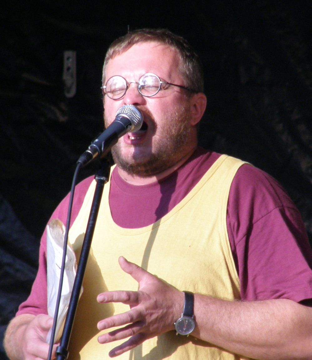 Hardi Volmer Hirvepargis.